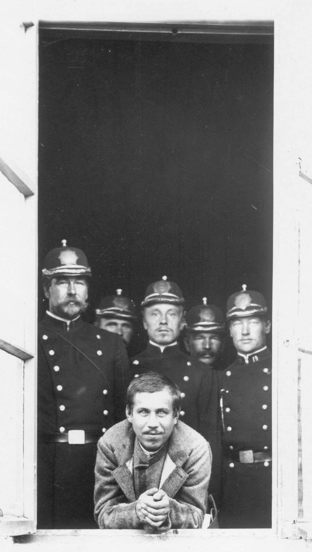 Обвиняемый по делу об убийстве М.Я.Герценштейна Егор Ларичкин под охраной в окне здания